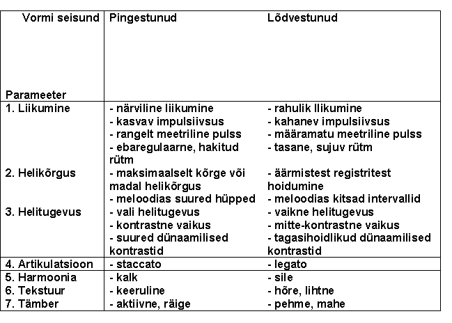 Vormi võimalikud seisundid "pingestunud" ja "lõdvestunud" erinevates parameetrites sisalduva muusikalise materjali poolt mõjutatuna